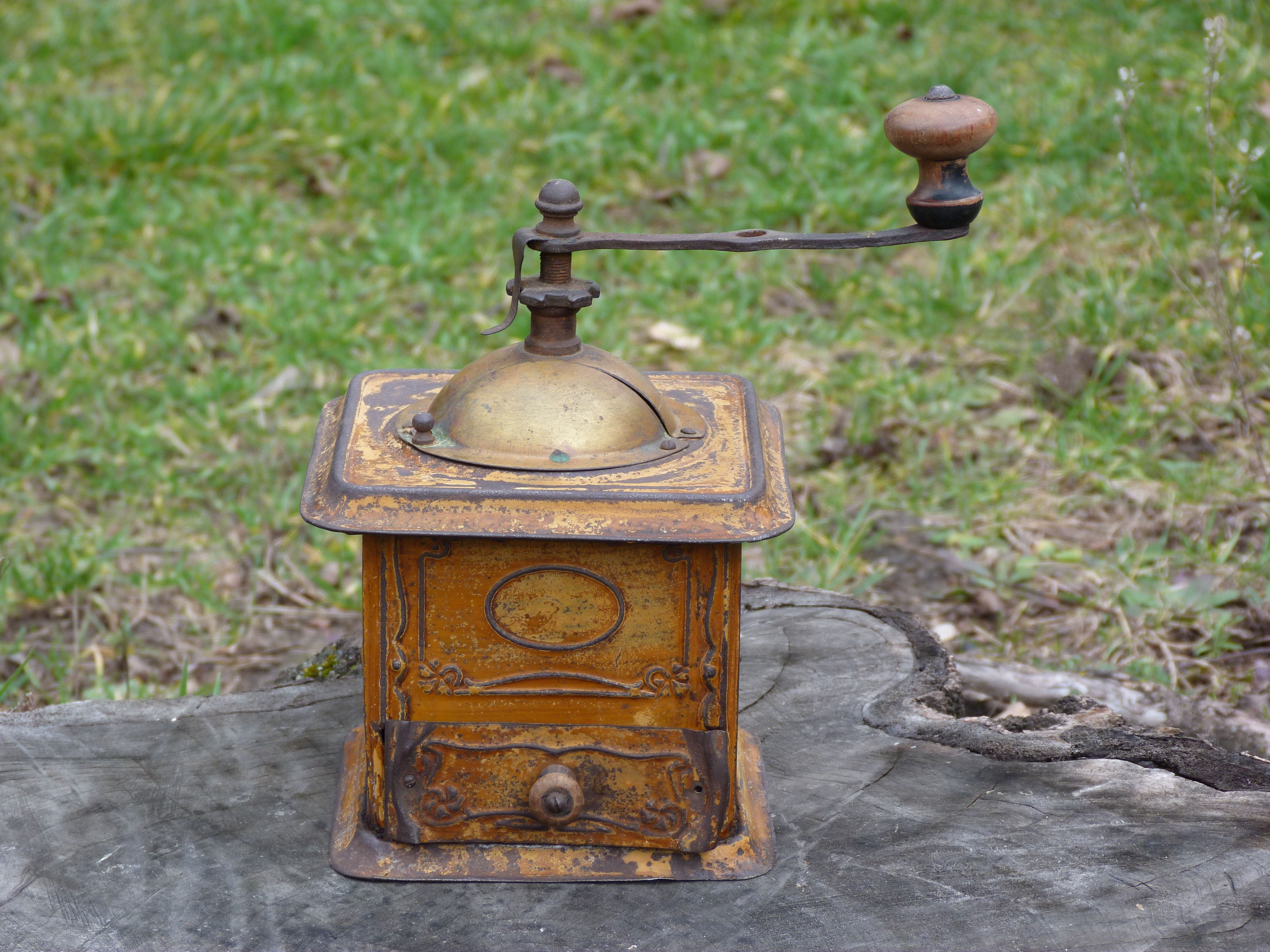 A felvétel 2014. február 23 -án készült. Kávédaráló.